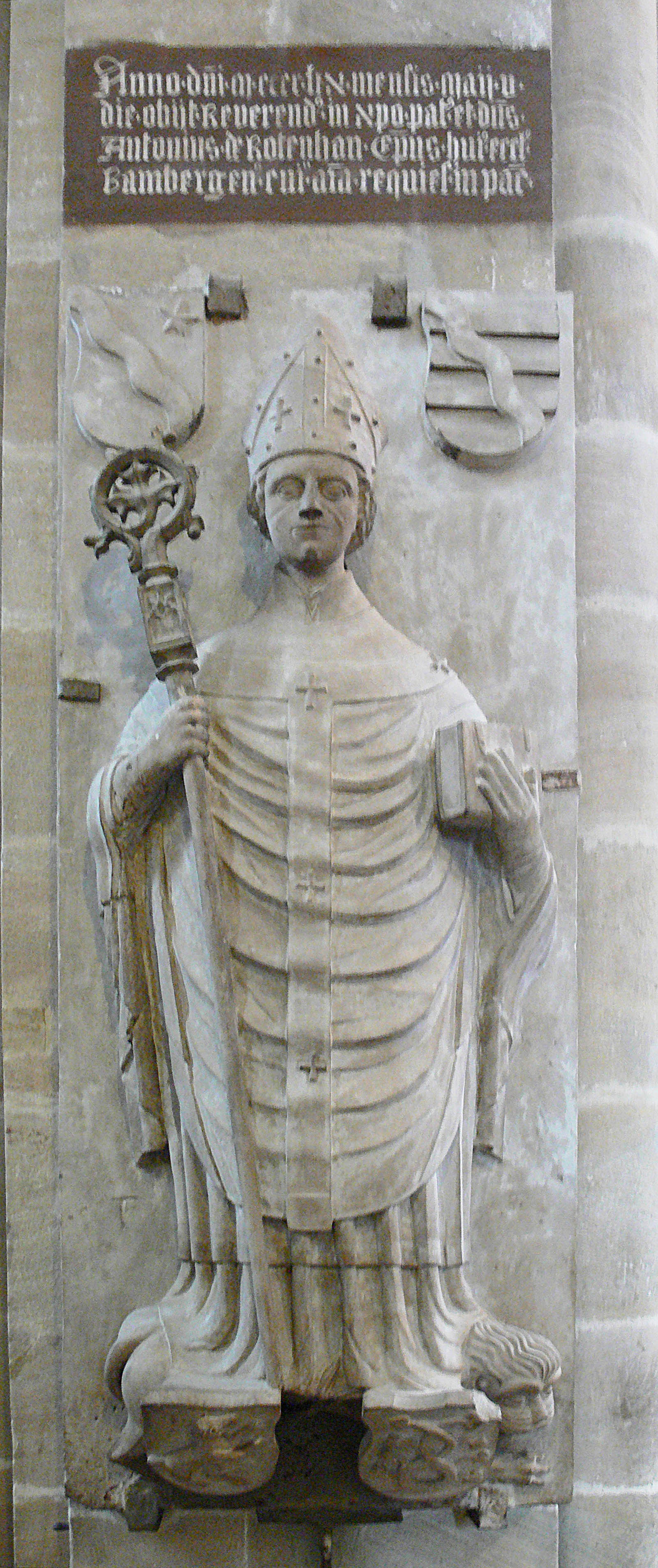 Bamberg, Dom St. Peter und St. Georg Grabplatte Bischof Anton von Rotenhan († 1459)